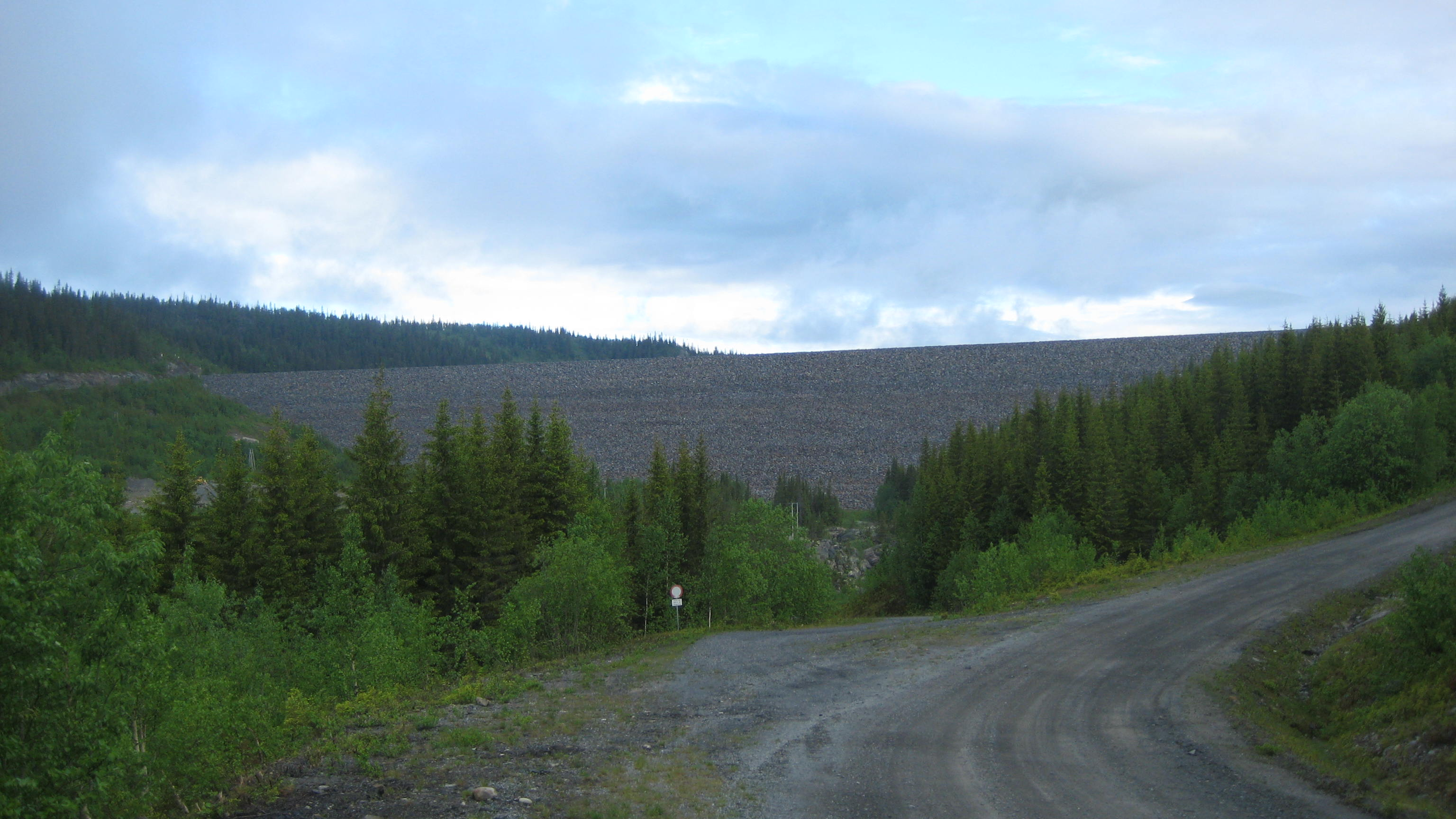 Dokkfløydammen i Torpa